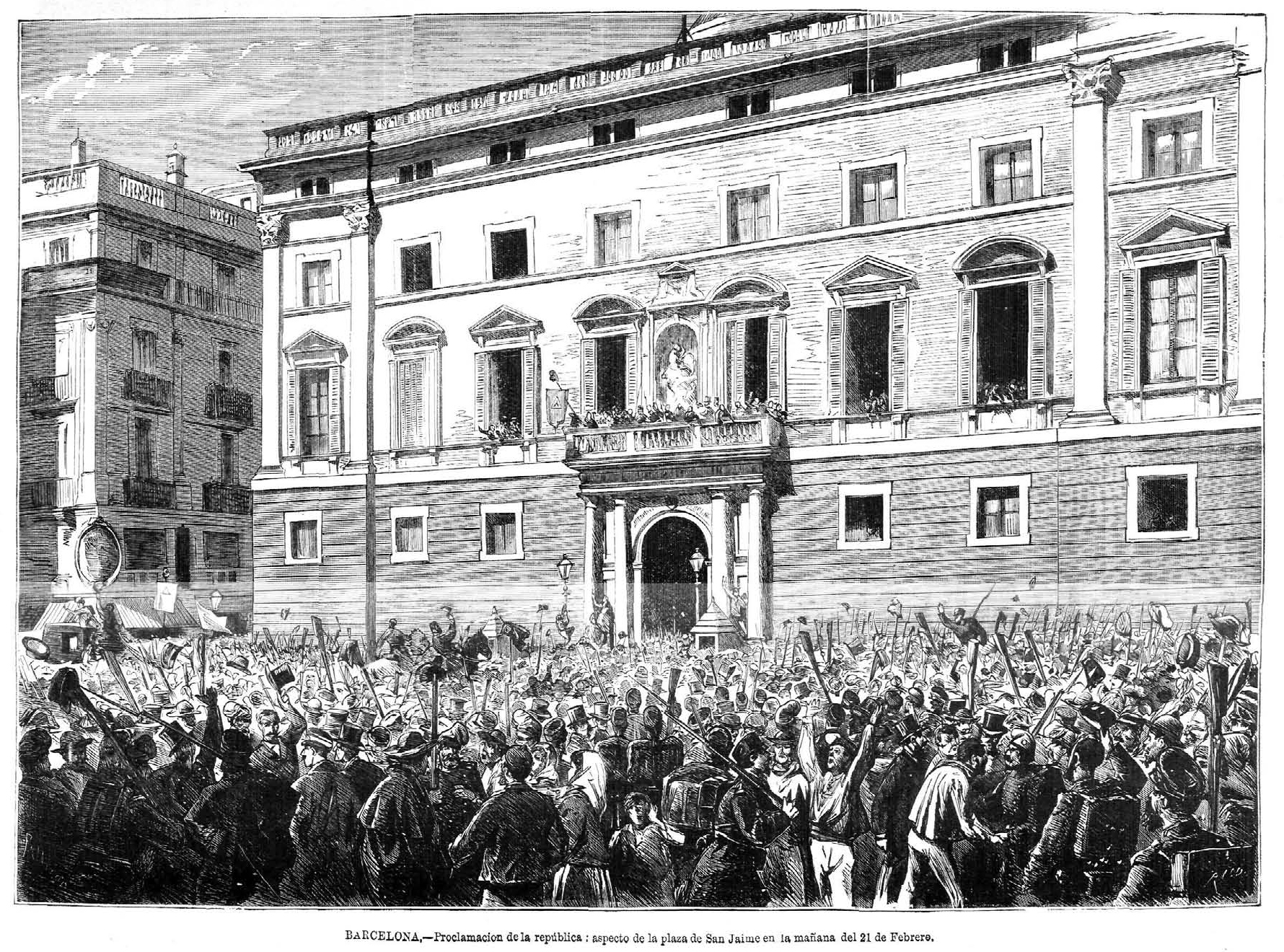 Barcelona, proclamación de la república, aspecto de la plaza de San Jaime en la mañana del 21 de febrero, en la revista española La Ilustración Española y Americana.